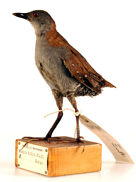 Baillon's Crake